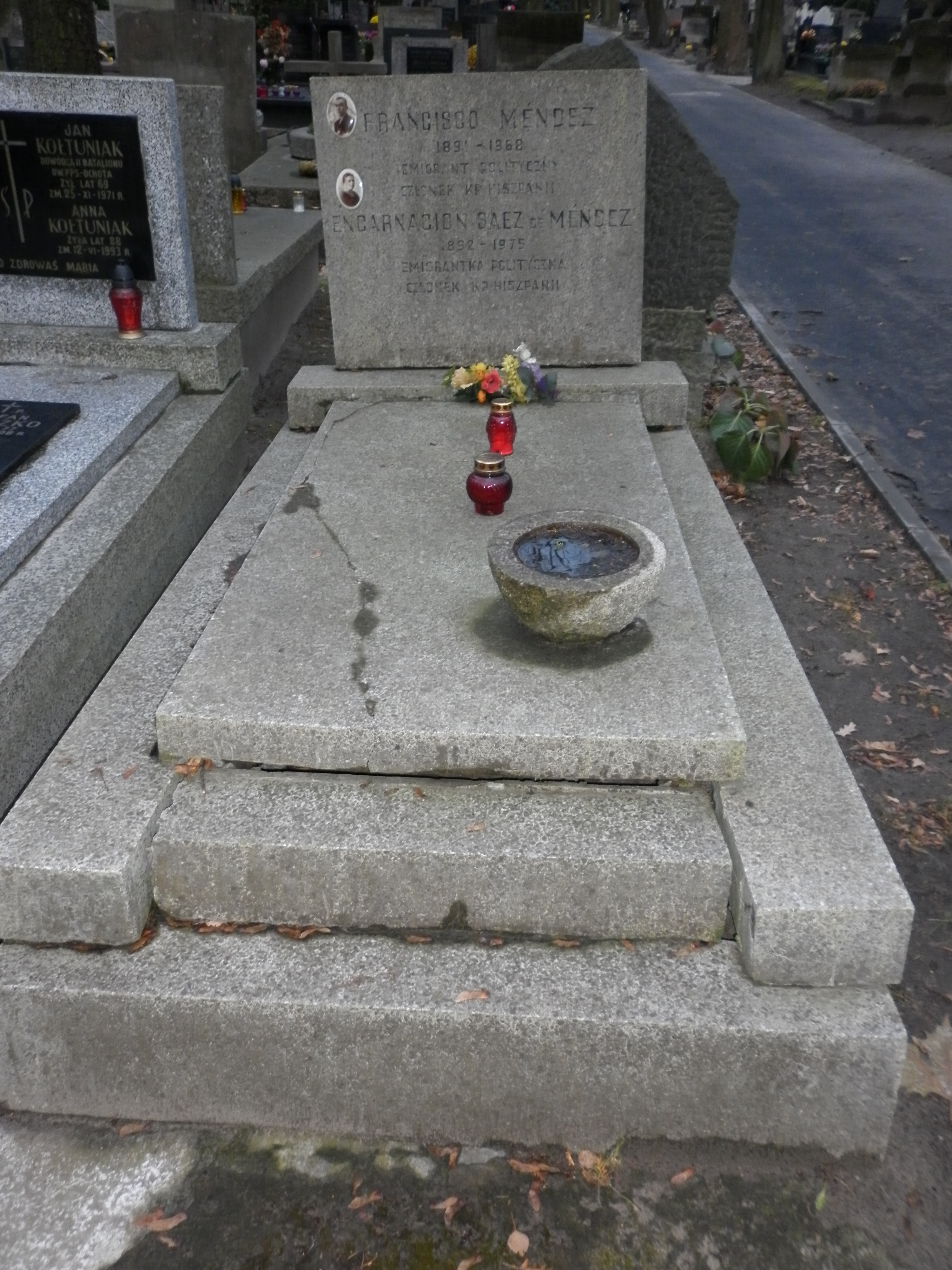 Grób Francisco Mendeza na Wojskowych Powązkach